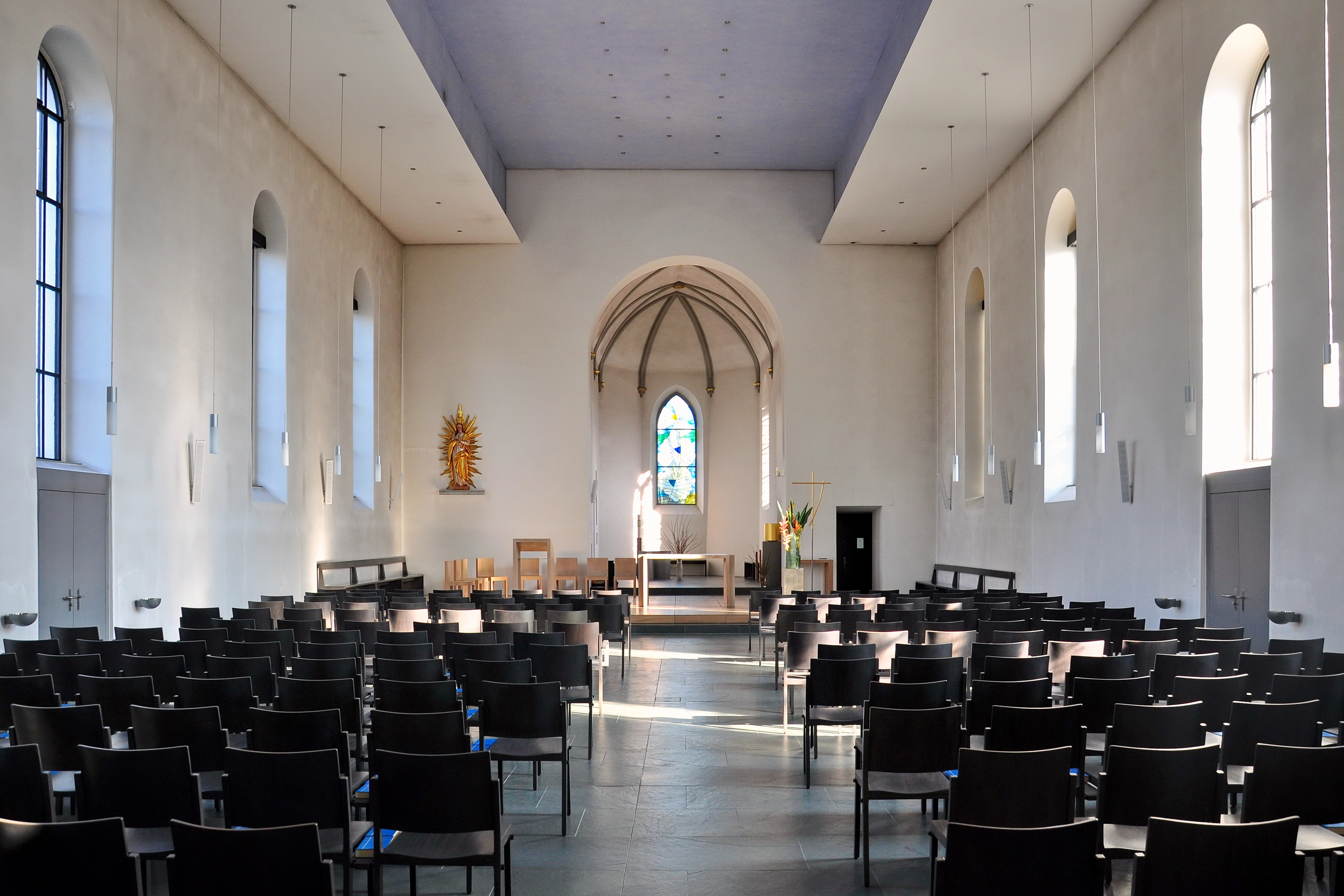 Mariae Himmelfahrt & St. Valentin in Jona (Switzerland)